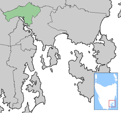 LGA de Brighton, Tasmanie, Australie